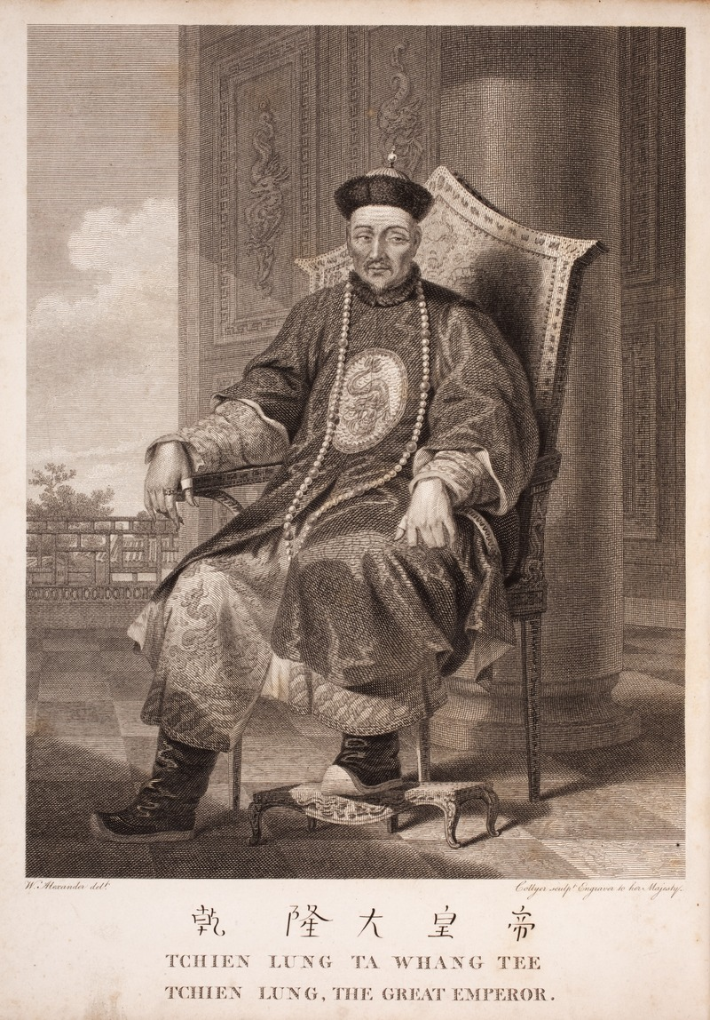 ציור מערבי של הקיסר צייאנלונג